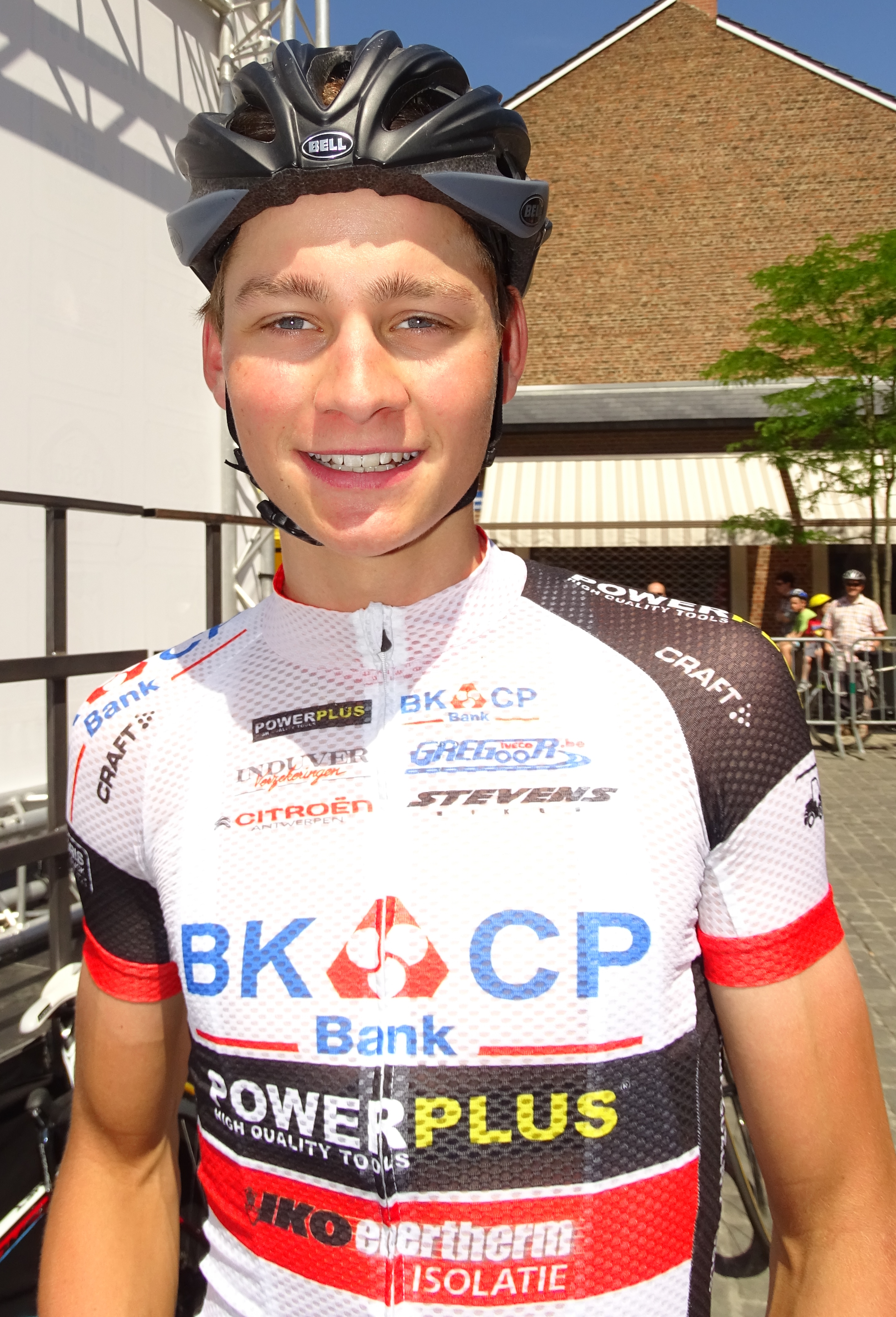 Reportage réalisé le dimanche 14 juin à l'occasion du départ et de l'arrivée du Tour du Limbourg 2015 à Tongres, Belgique.